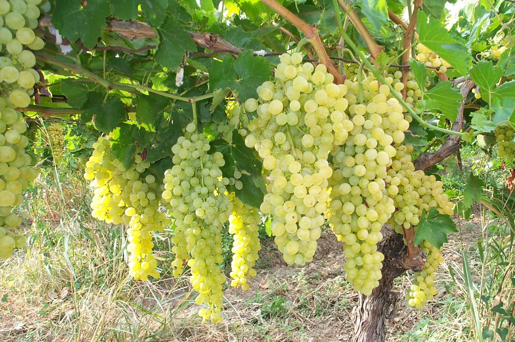 kişisel resim